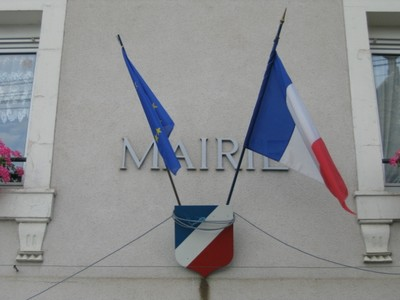 Mairie de Lavernat à l'heure Européenne.